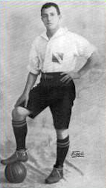 Angel "Loco" Romano hacia 1924